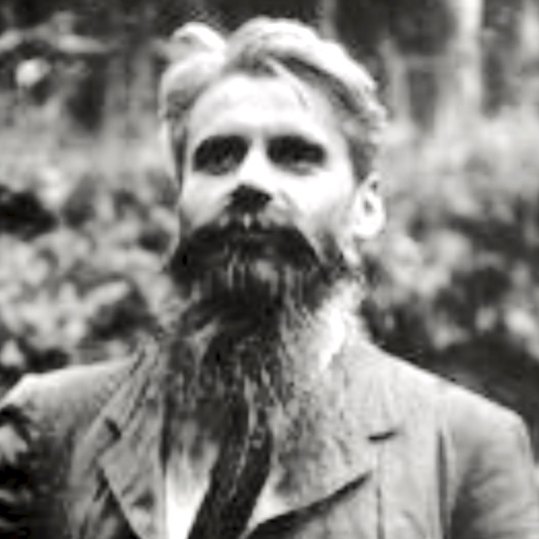 Paul Geheeb (1870–1961)